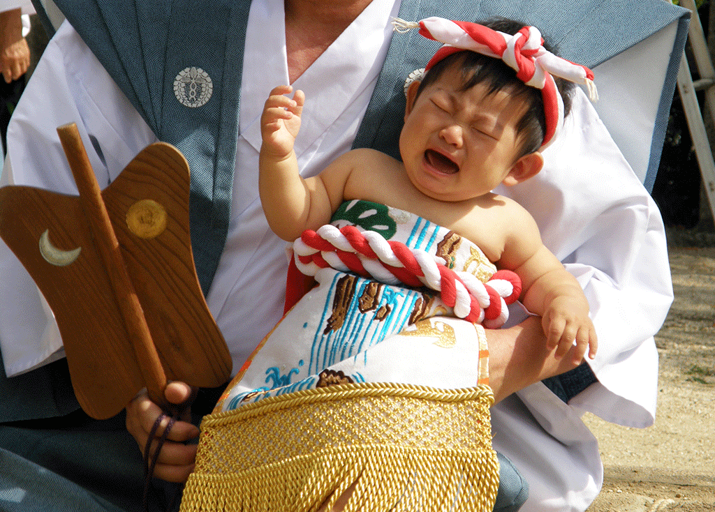 山王宮日吉神社の行事「赤ちゃんの初土俵入」